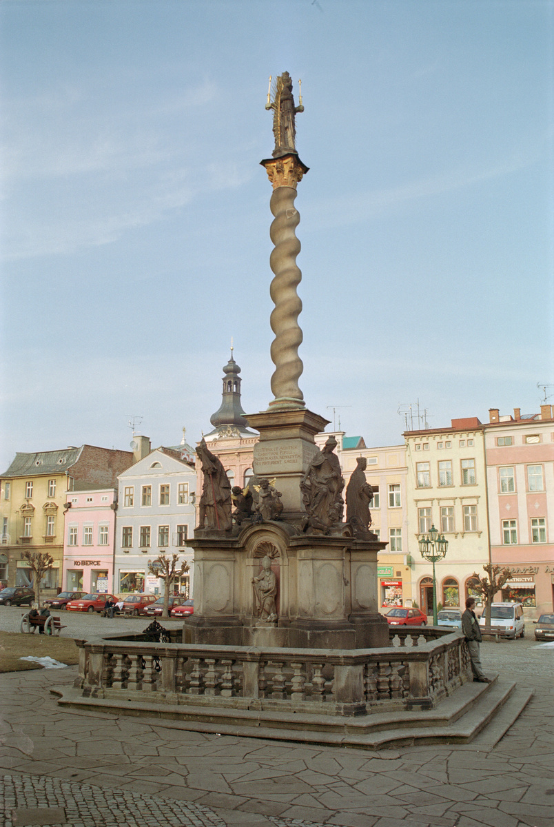 Mariánský sloup na náměstí v Broumově, okres Náchod. Sloup s doprovodnými sochami světců dílem Jana Brokoffa a jeo syna Michala Jana z roku 1706, sousoší Panny Marie s Ježíškem na vrcholu pochází z roku 1728. self taken picture, taken in early 2005 market place of Broumov